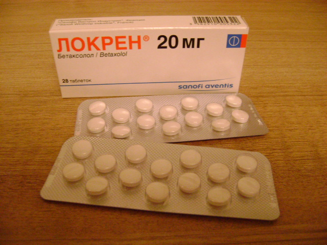 упаковка таблеток Локрен